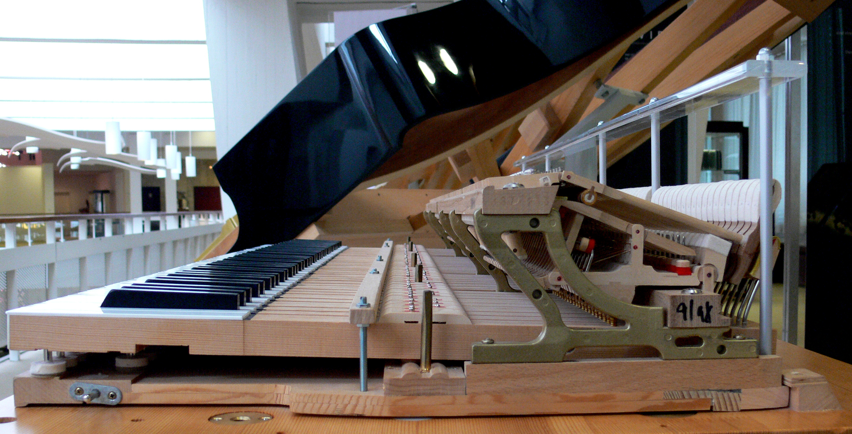 Flügelmechanik Musikinstrumentenmuseum Berlin